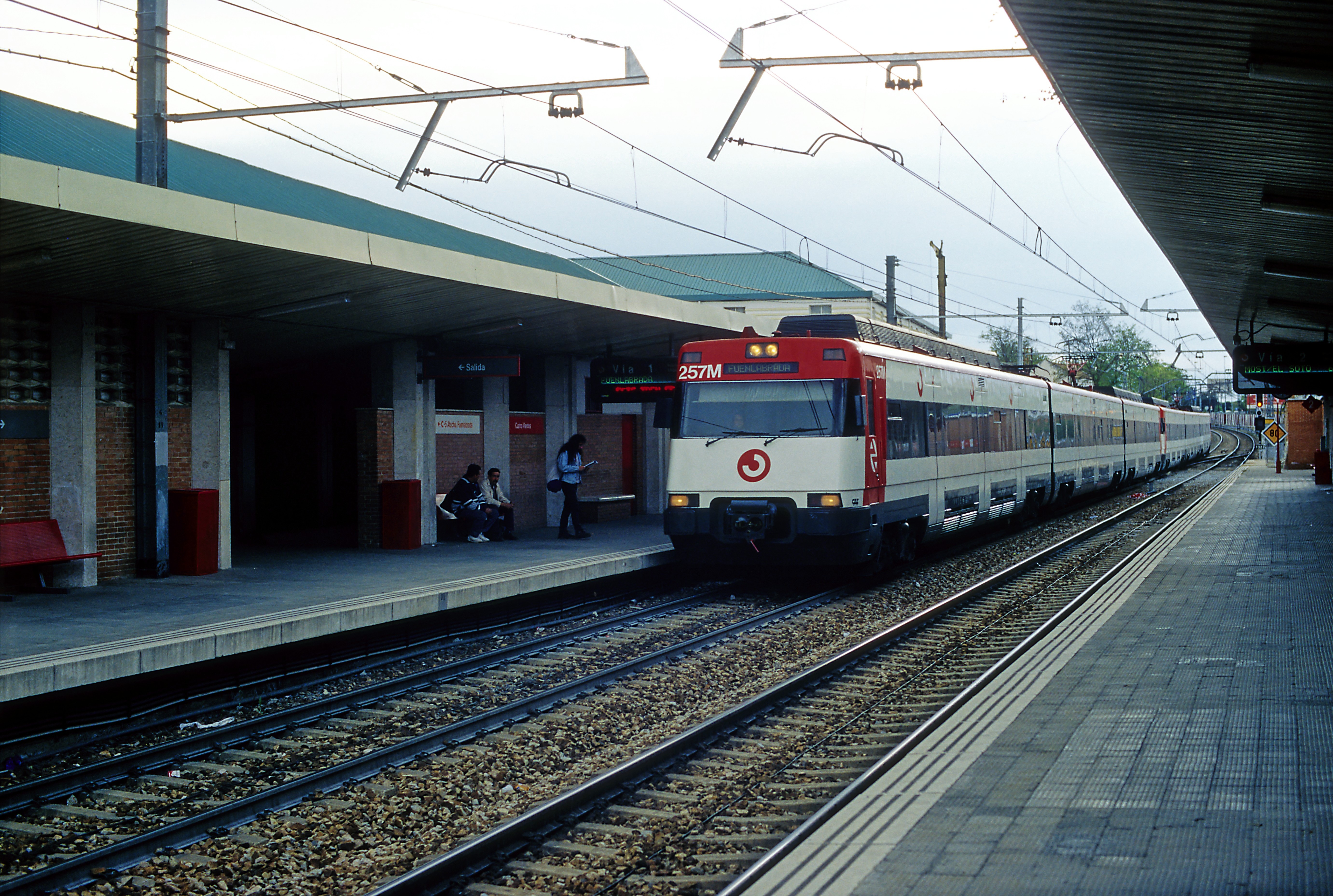 Cercanías Madrid, Linie C5, Streckenast nach Móstoles–El Soto. Cuatro Vientos ist der erste Haltepunkt nach dem Tunnel von Atocha. Die Linie 5 ist als einzige mit LZB ausgerüstet. Zug Richtung Fuenlabrada über Atocha und Villaverde Alto.